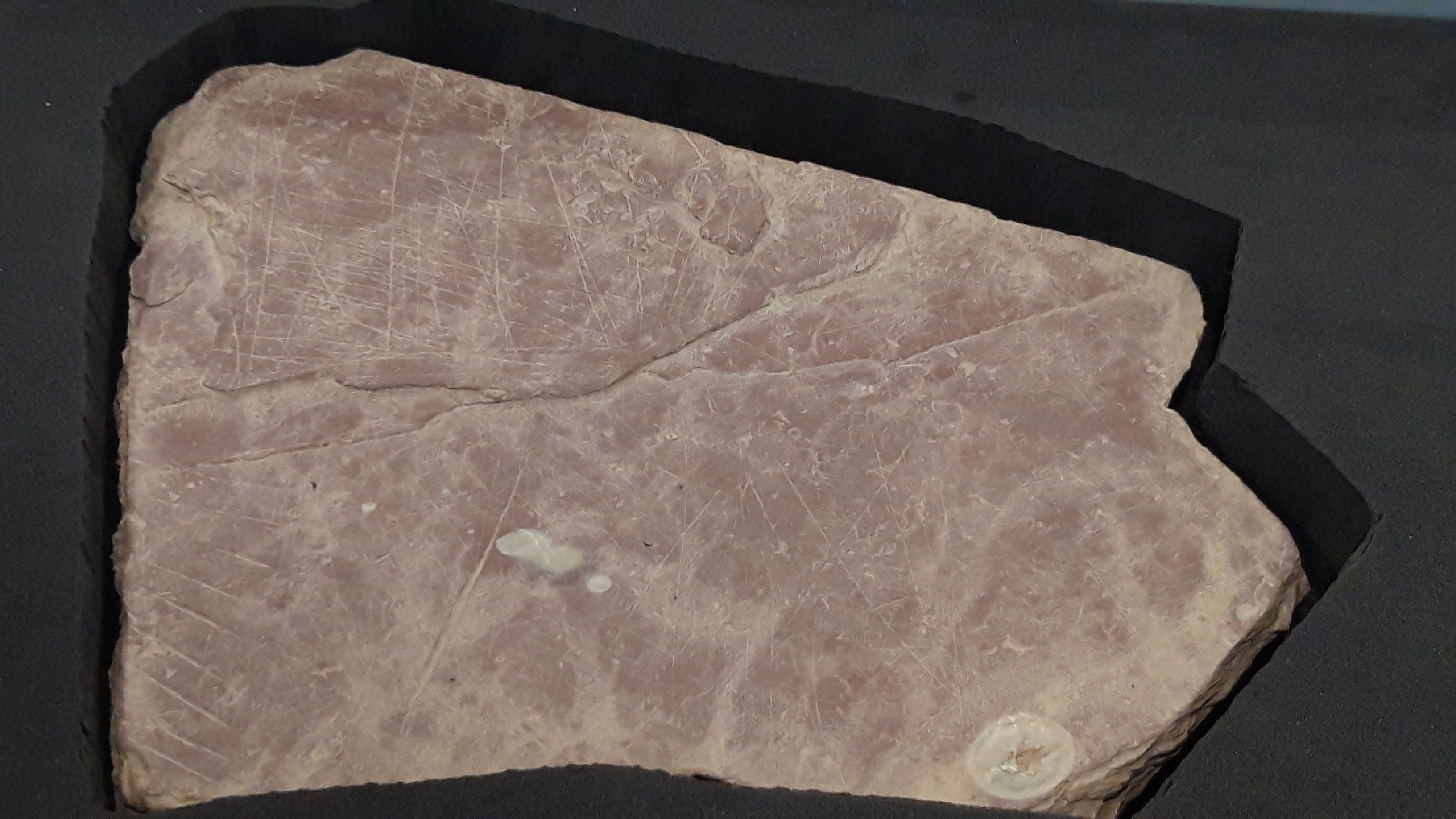 Ebakidurak dituen Basagaingo harlauza. Euskal Herriko lehen hiri-planoa izan daitekeena.